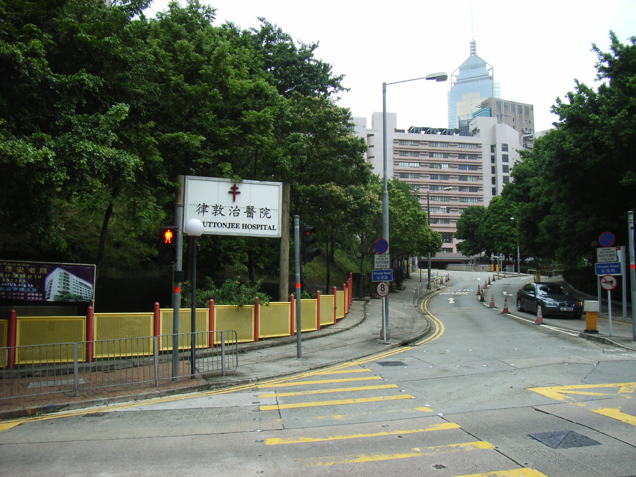 律敦治醫院 Ruttonjee Hospital BY RICHARD MARTIN.